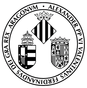 Escudo Universitat de València